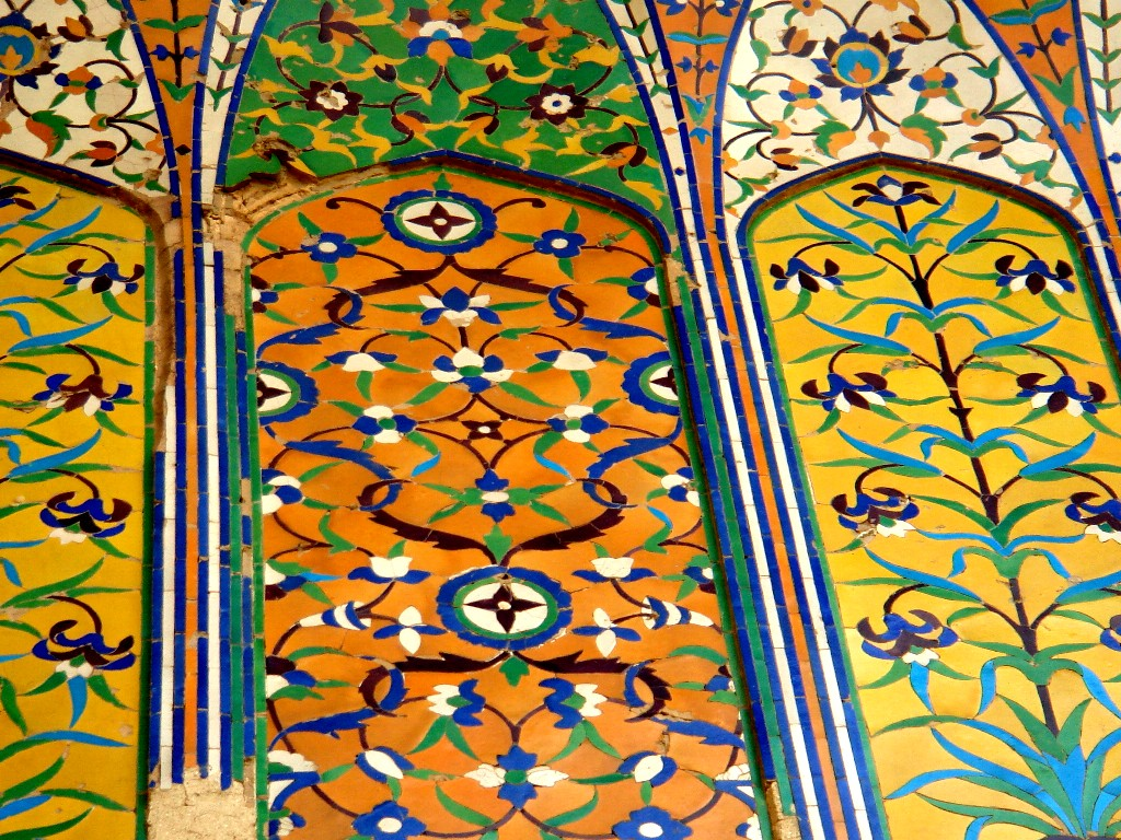 Asif Khan Mausoleum